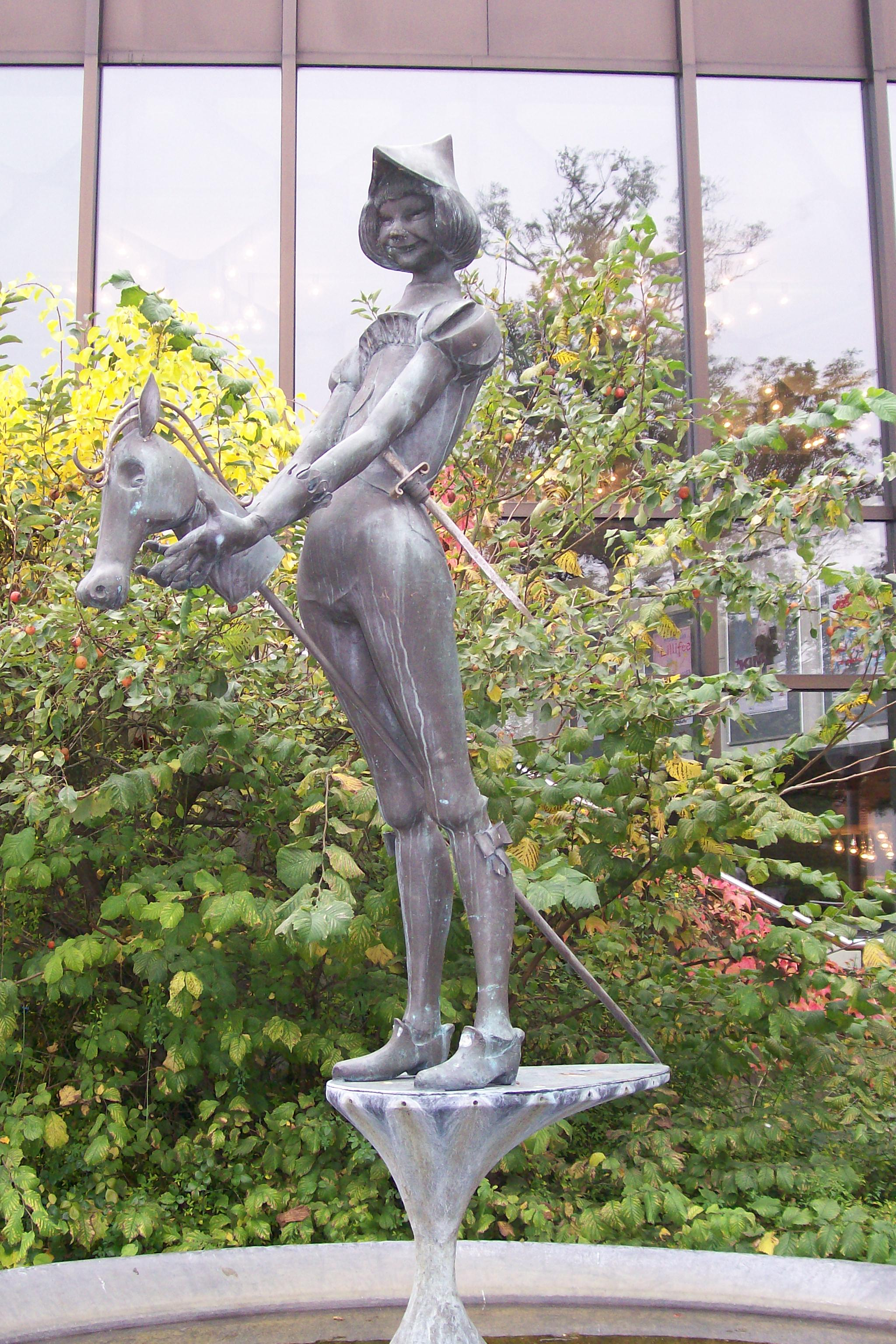 Plastik Steckenpferdreiter in Osnabrück des Osnabrücker Bildhauers Hans Gerd Ruwe